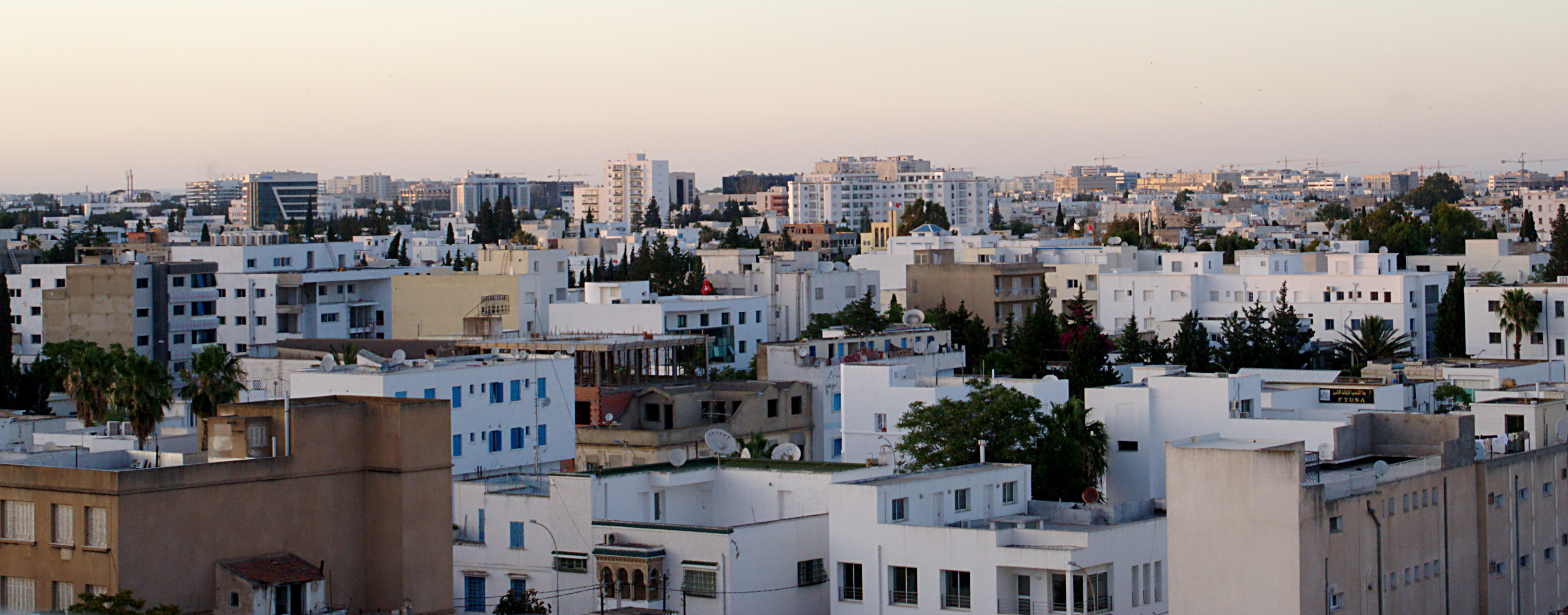 Vue depuis un hôtel de Tunis du quartier de Montplaisir